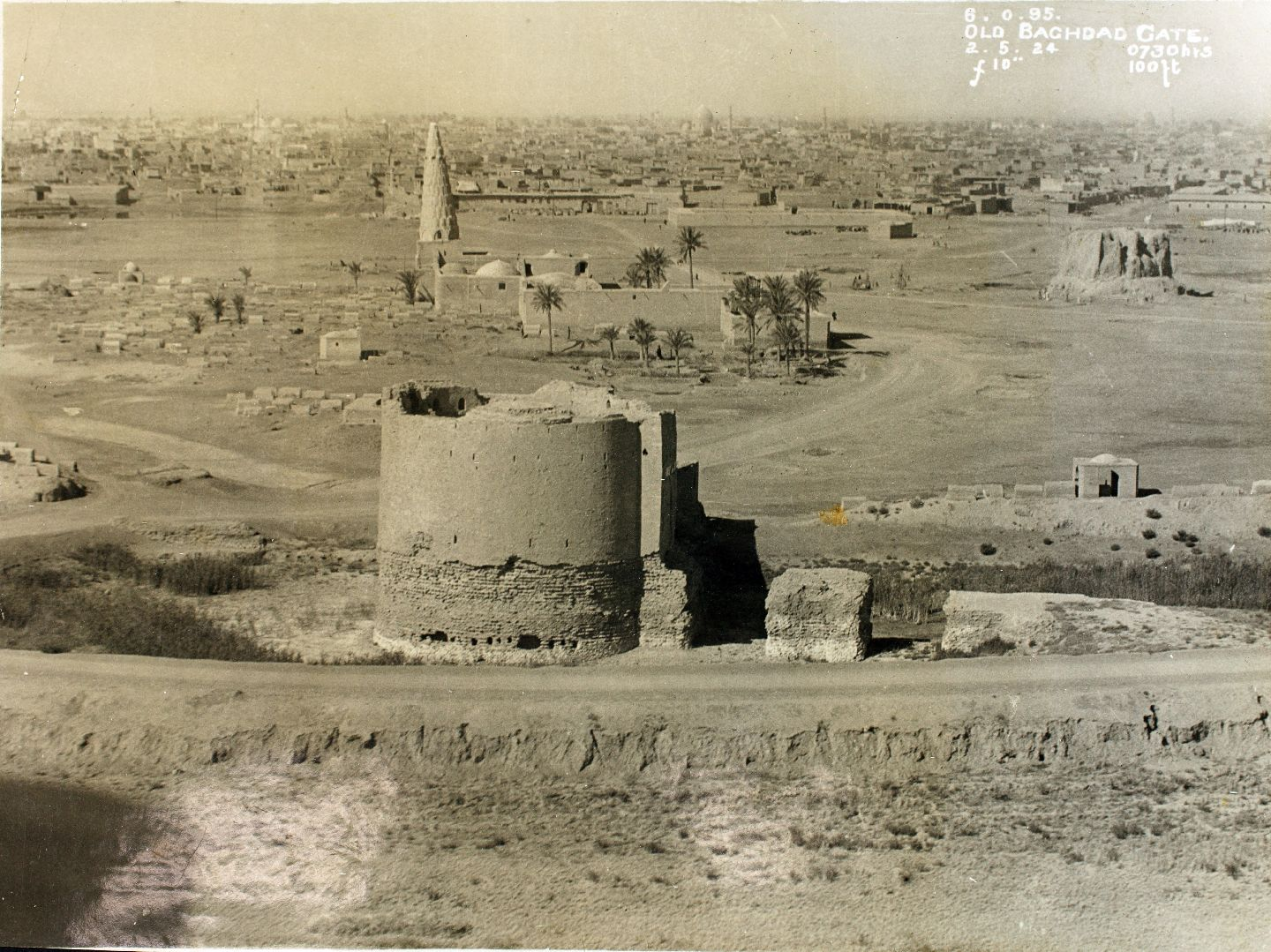 بقايا آثار الباب الوسطاني الذي هدم عند خروج الجيش العثماني من بغداد ويقع قرب مرقد الشيخ عمر السهروردي الواقع في المقبرة الوردية في جانب الرصافة من مدينة بغداد ويعلو مرقد الضريح قبة مخروطية على طراز القبب السلجوقية في عام 1924